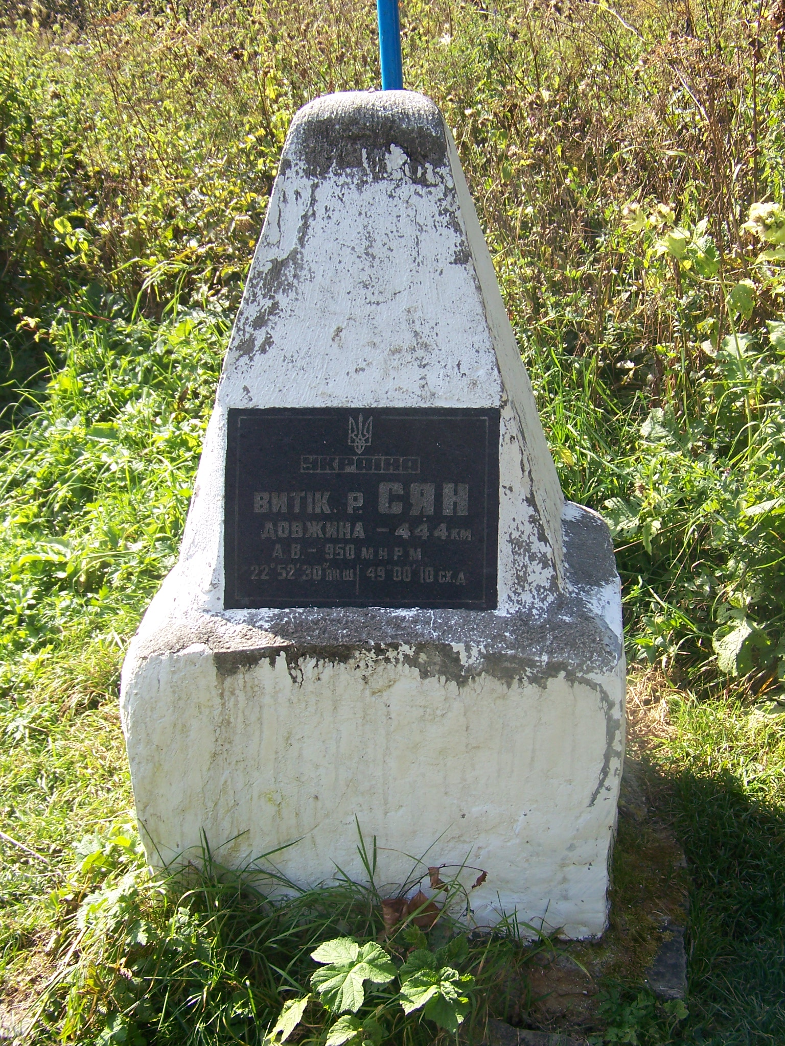 Źródło rzeki San, tablica informacyjna na granicy polsko - ukraińskiej